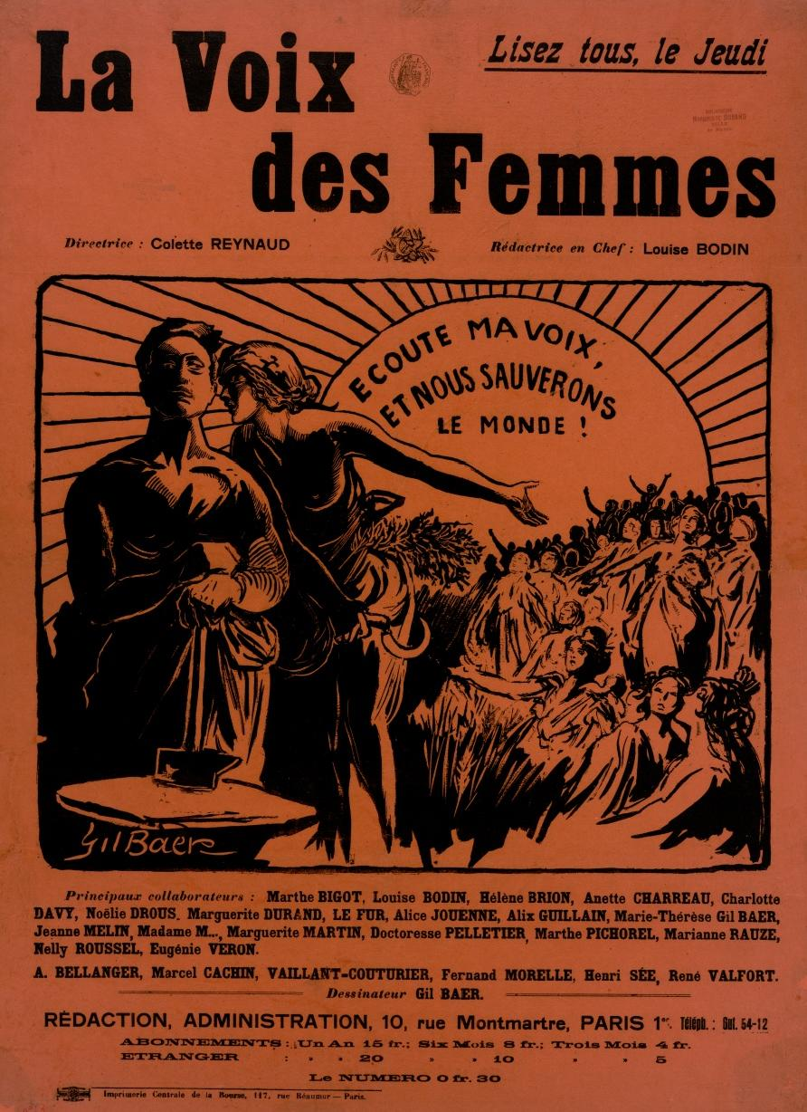 Affiche : La Voix des Femmes : écoute ma voix et nous sauverons le monde !